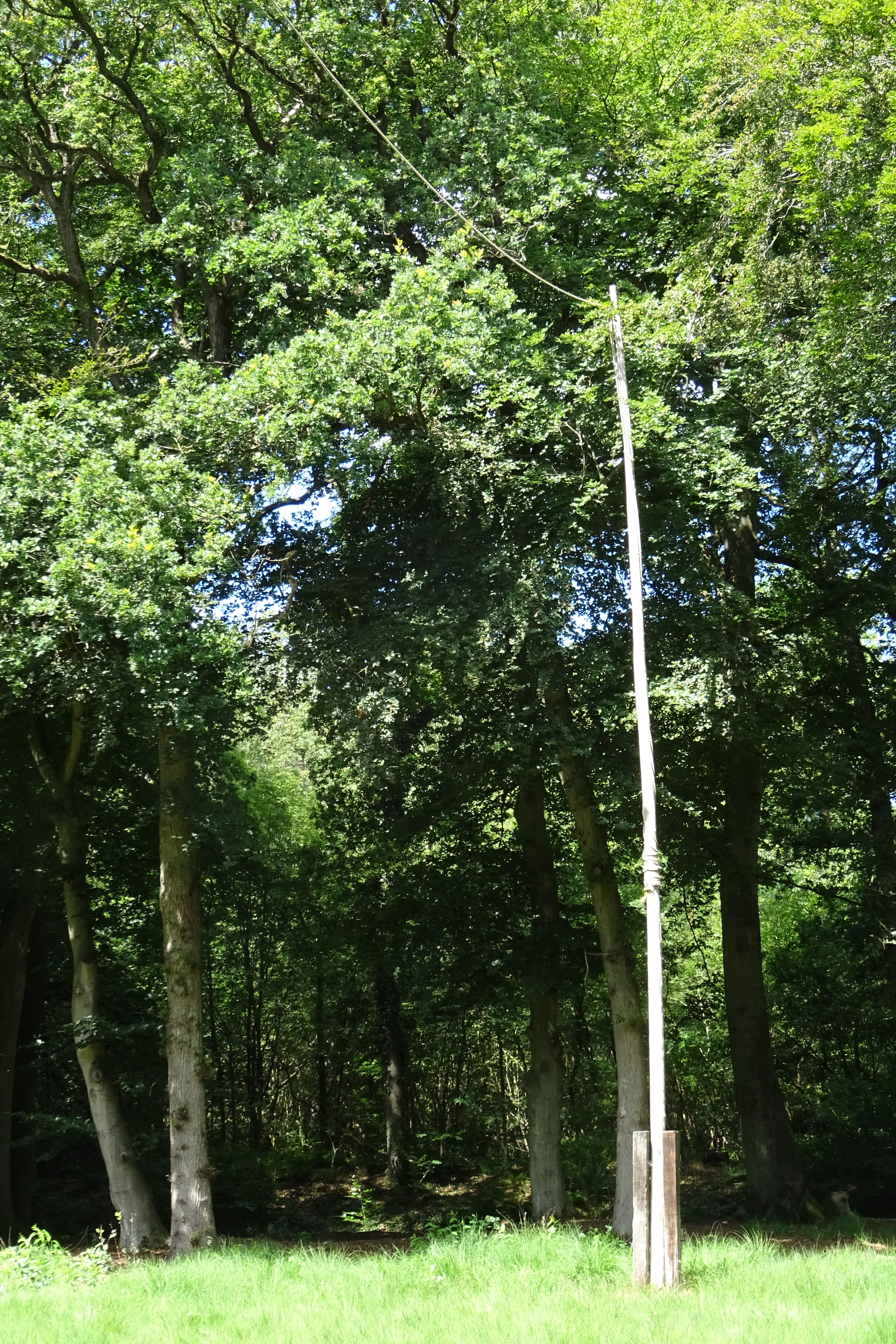 Een "snippenflouw" - twee palen waartussen een vangnet werd gespannen om snippen te vangen - in het Rysterbosk